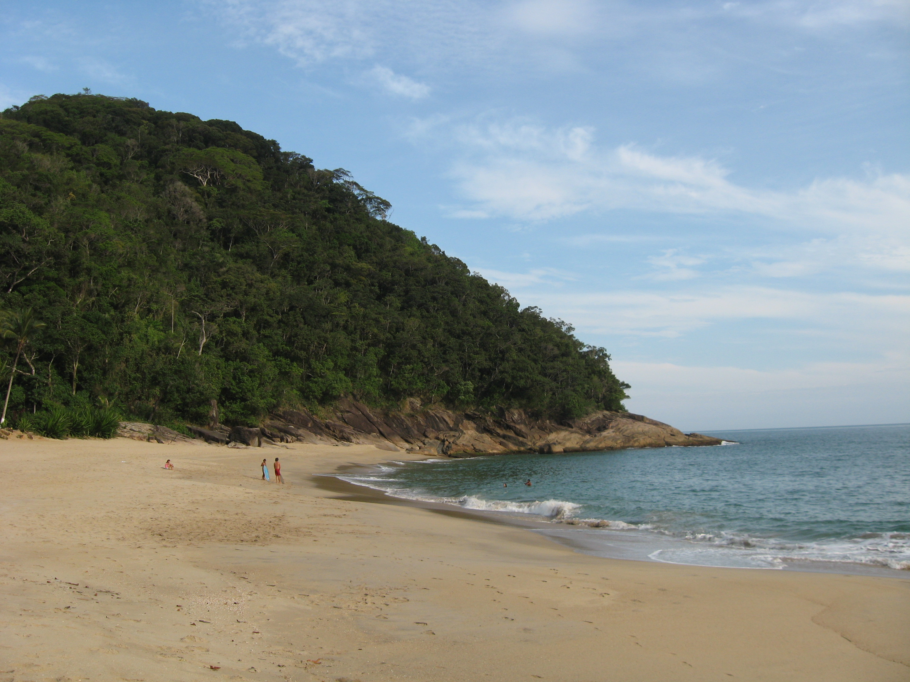 Bucht von Sonunga, Ubatuba, Brasilien